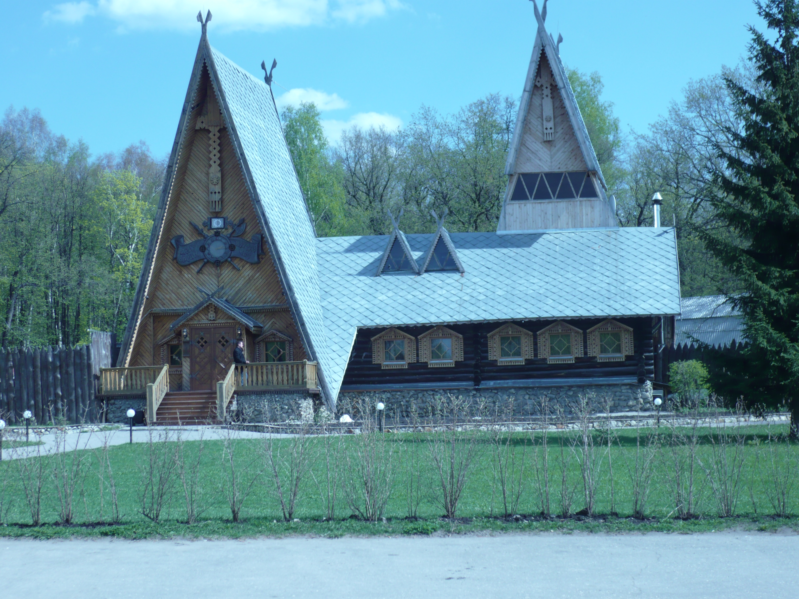 Ресторан "Засека", город Пенза, Россия